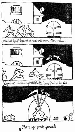 (Neskatxak leihotik)- Lapurrak, eta ni bakarrik etxea! Zer egin?... // Lapurrak ate ostera berituta)- Barrenean jende asko duk! // Barrengo jende guztia.